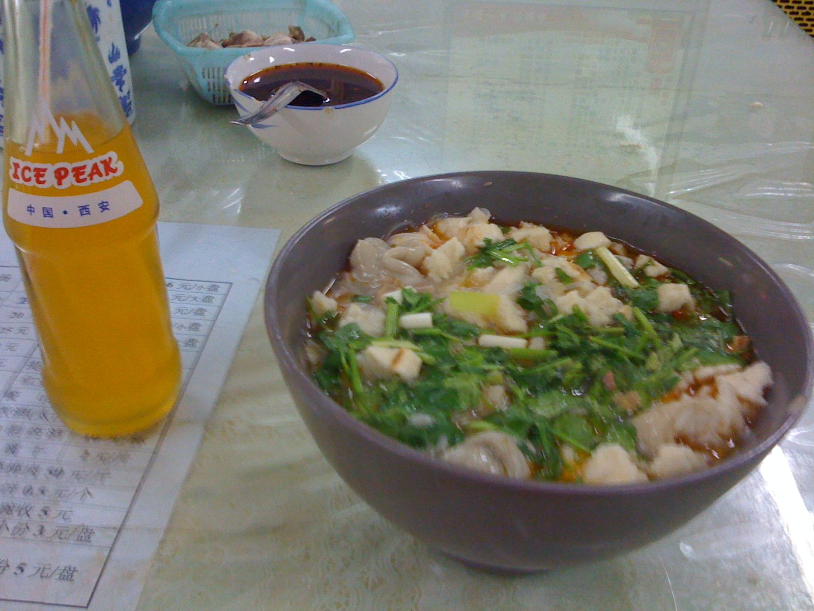 西安天发芽葫芦头泡馍与冰峰汽水